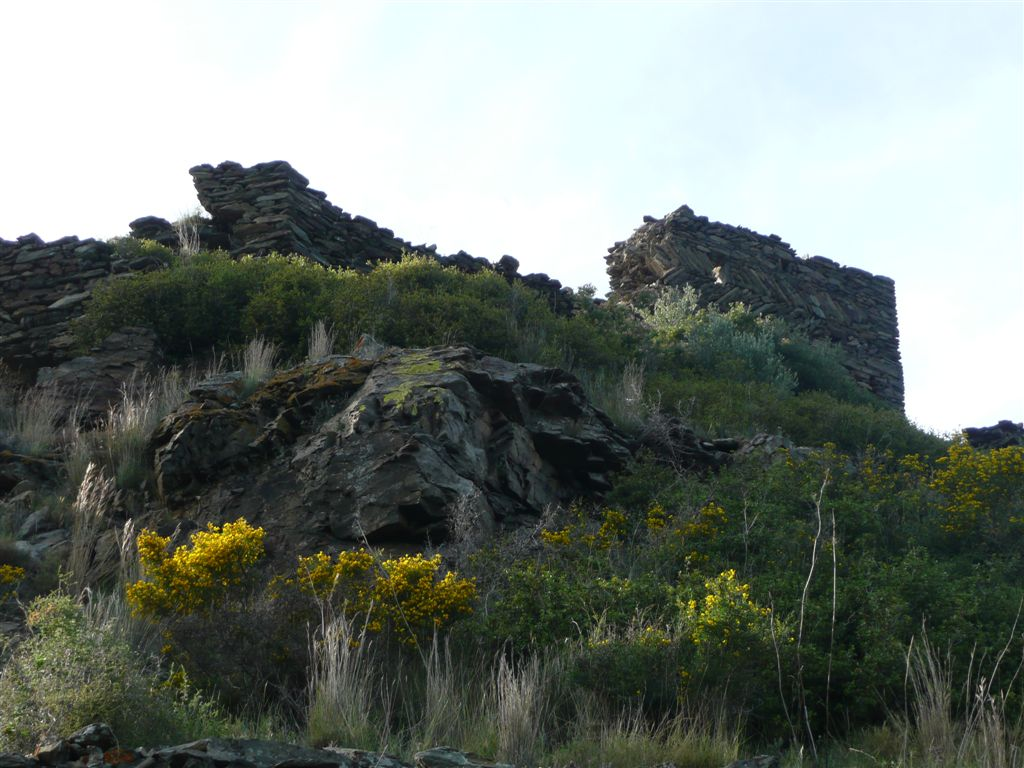 Castell de Bufalaranya (Roses, Alt Empordà). Torre de l'homenatge i muralla nord.